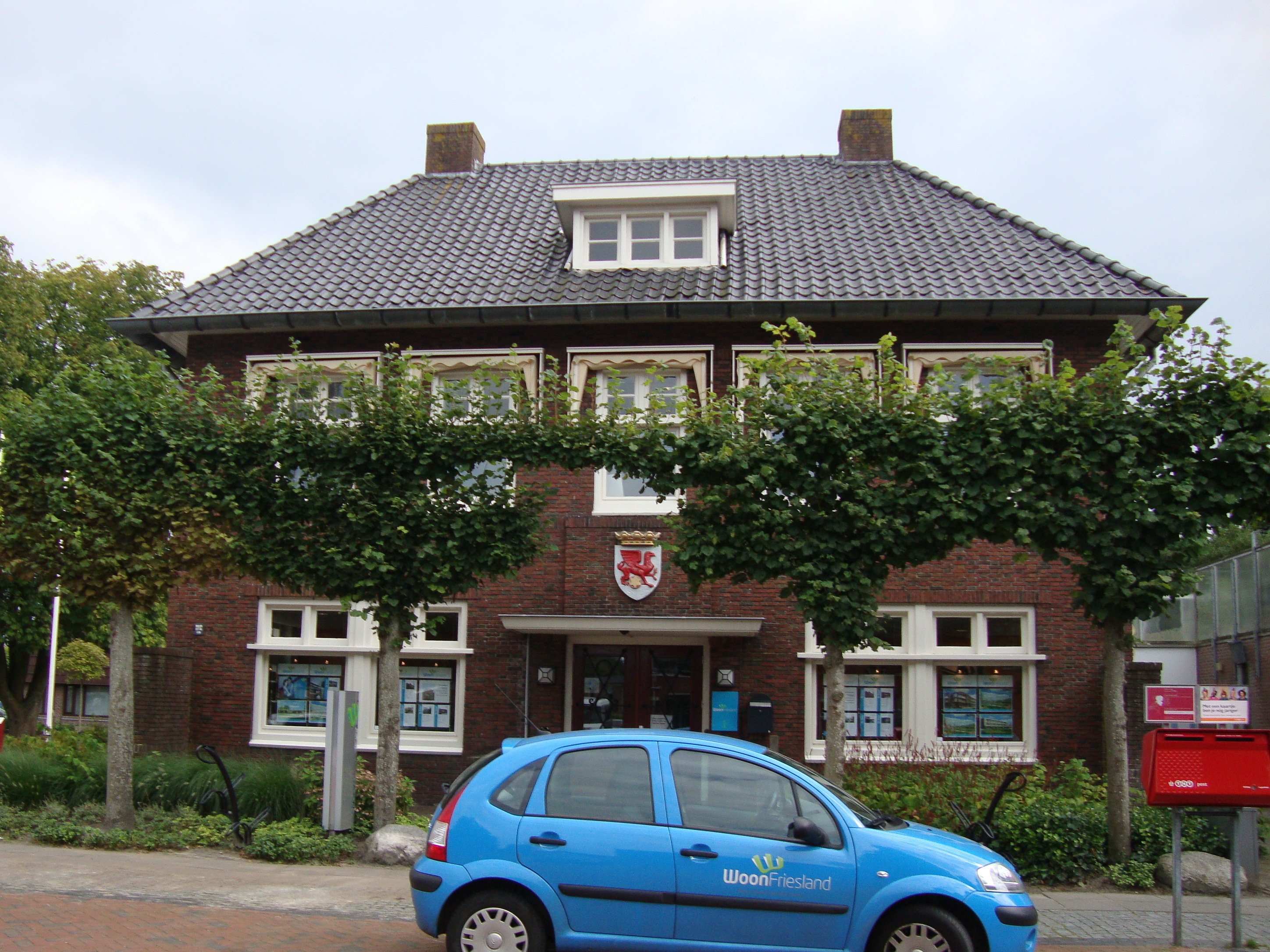 Oud gemeentehuis van Ooststellingwerf in Oosterwolde (provincie Friesland, Nederland)